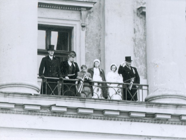 Kong Haakon VII, Kronprinsesse Märtha, Prins Harald, Prinsesse Ragnhild, Prinsesse Astrid og Kronprins Olav.